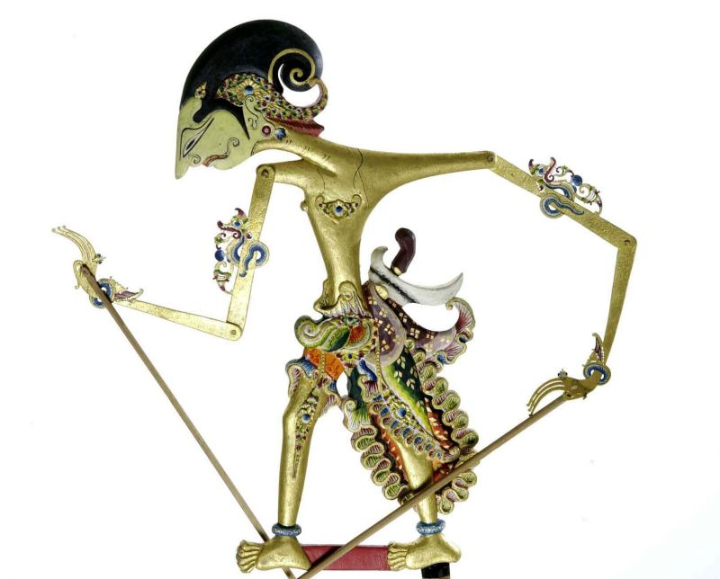 Wajangfiguur. Platte houten wajangpop mogelijk Damar Wulan Unknown language: Wayang kelitik Wayang kerucil